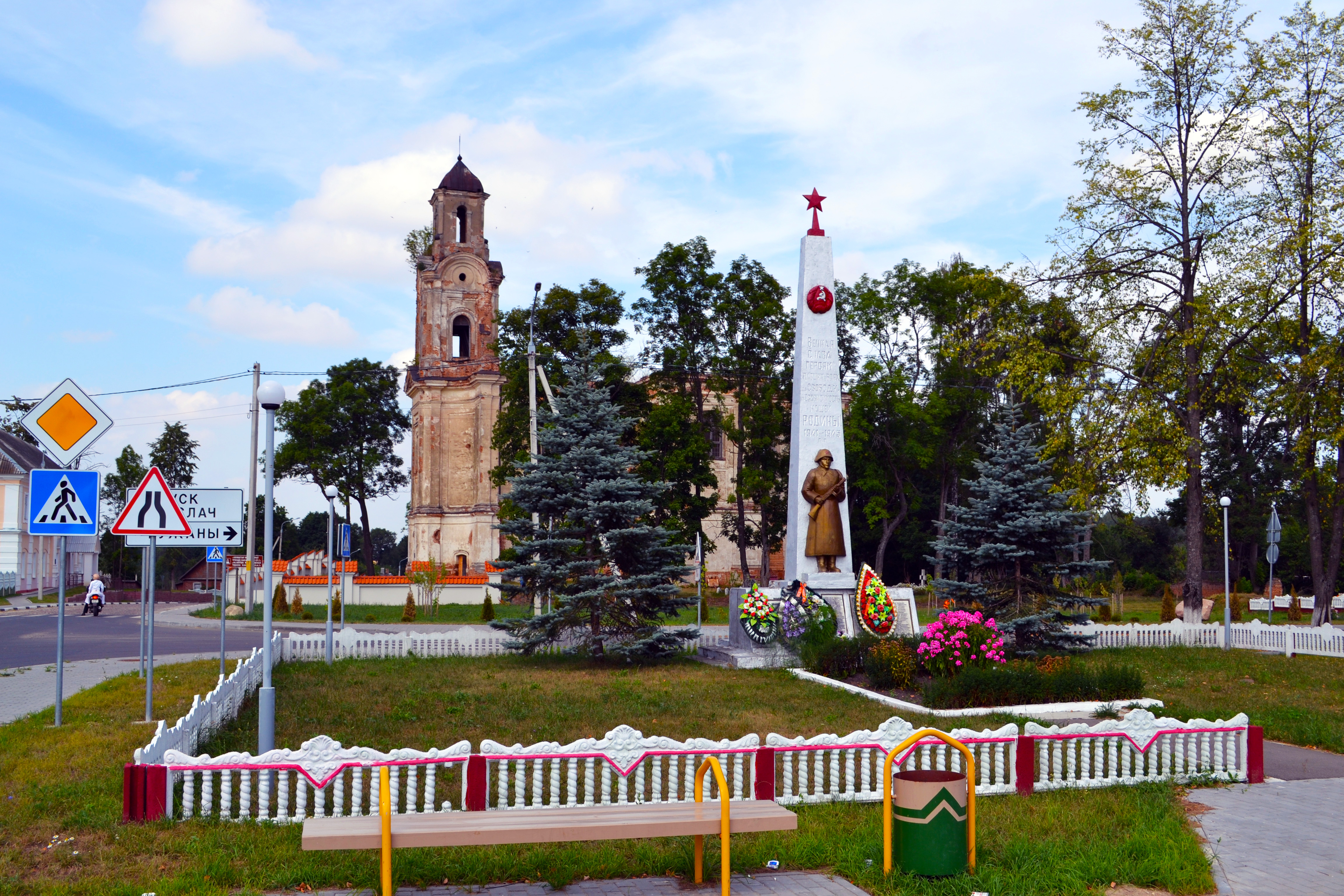 Беларуская (тарашкевіца): Траецкі касьцёл (Лыскава) This is a photo of Belarusian heritage monument. Reference number: 112Г000621 ( WLM)